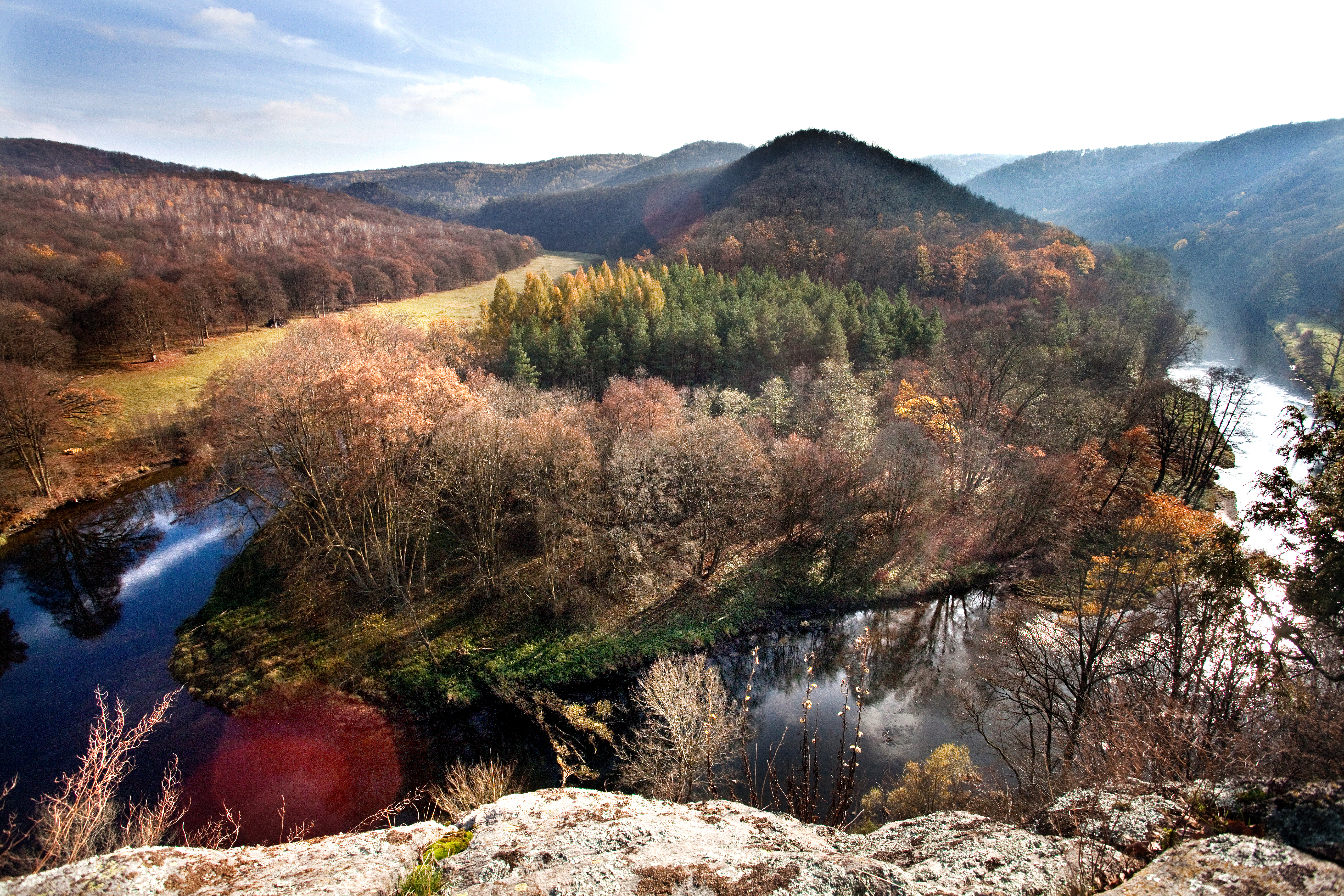 Umlaufberg, Gestein: Gneis. Lage: Nationalpark Thayatal, niederösterreichisches Grenzgebiet zu Tschechien. Eines der schönsten Durchbruchstäler Österreichs.